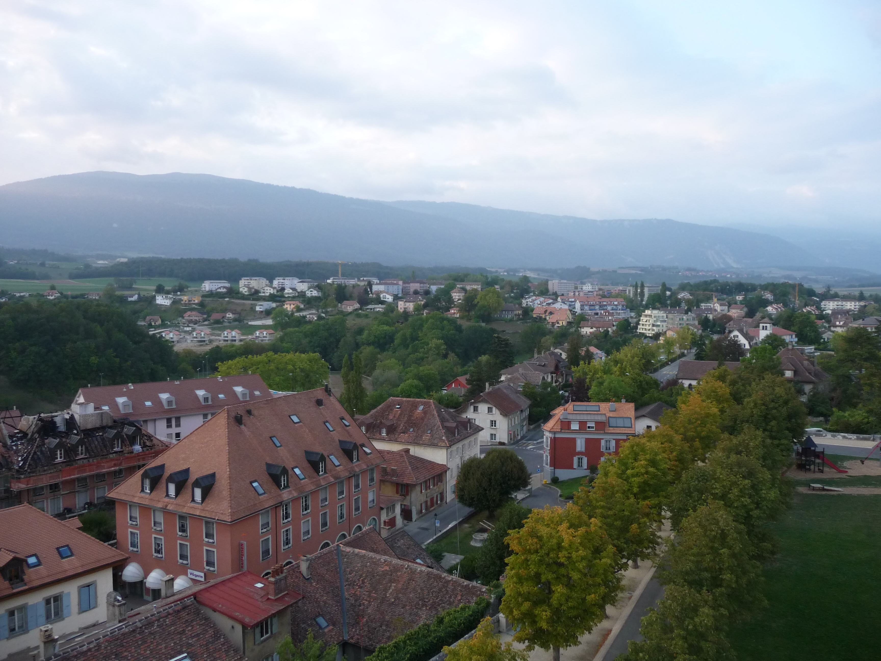 Orbe.